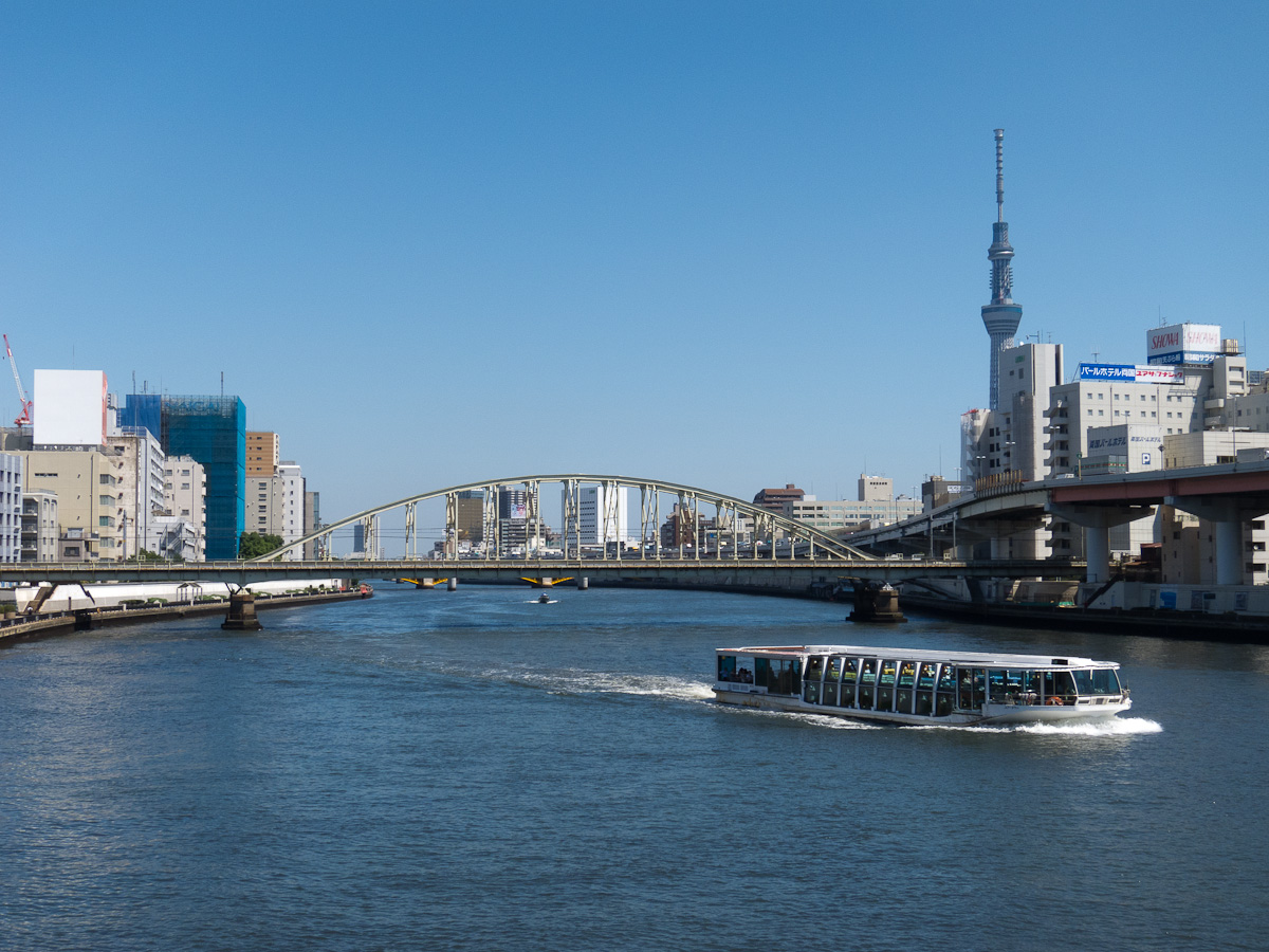 JR東日本総武本線隅田川橋梁、下流の両国橋より。